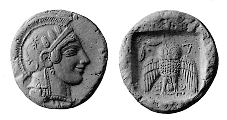 Décadrachme attique d'Athènes en argent, vers 467-465 av.JC. environ 42,5 g. Musée de Berlin. Planche illustrant le Traité des monnaies grecques et romaines d'Ernest Babeon 2e partie. éditions Paul Leroux, 1901. Photoglyptie de Michel Berhtaud (1845-1912) (planche XXXV - n°8)